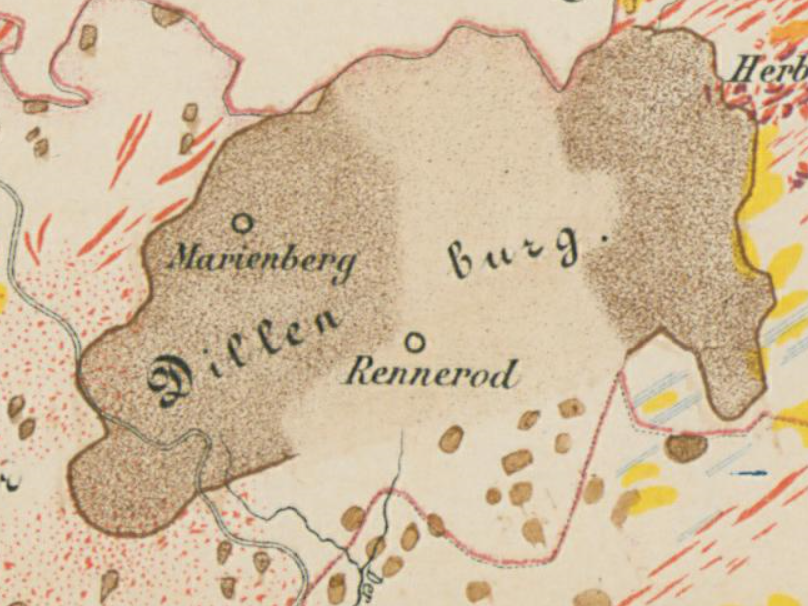 Ausschnitt des Westerwälder Braunkohlerevier von der der Karte Übersicht der Mineralvorkommen imRegierungsbezierk Wiesbaden